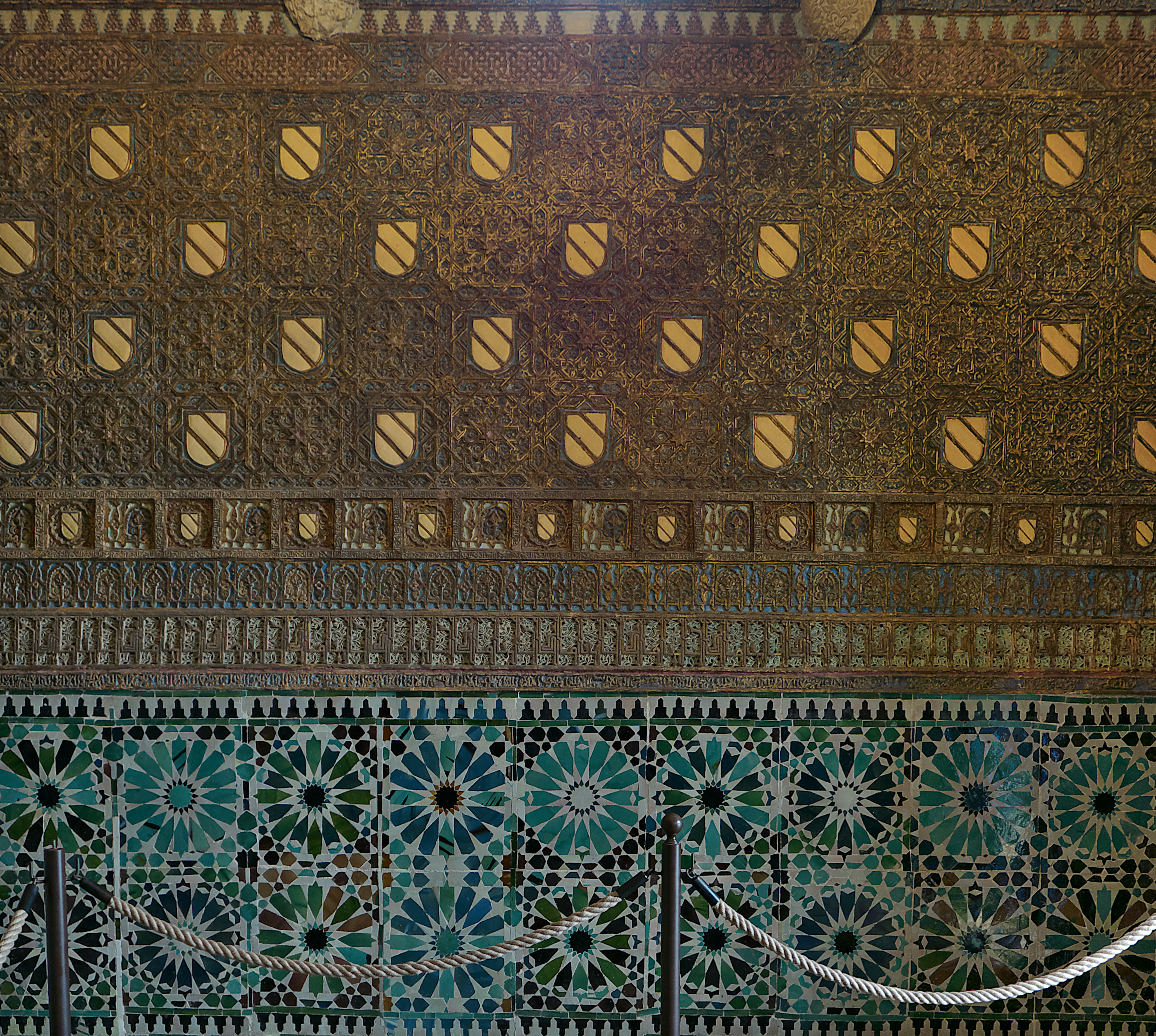 Interior del muro de los pies de la capilla funeraria.